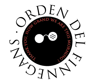 Logo de la Orden del Finnegans